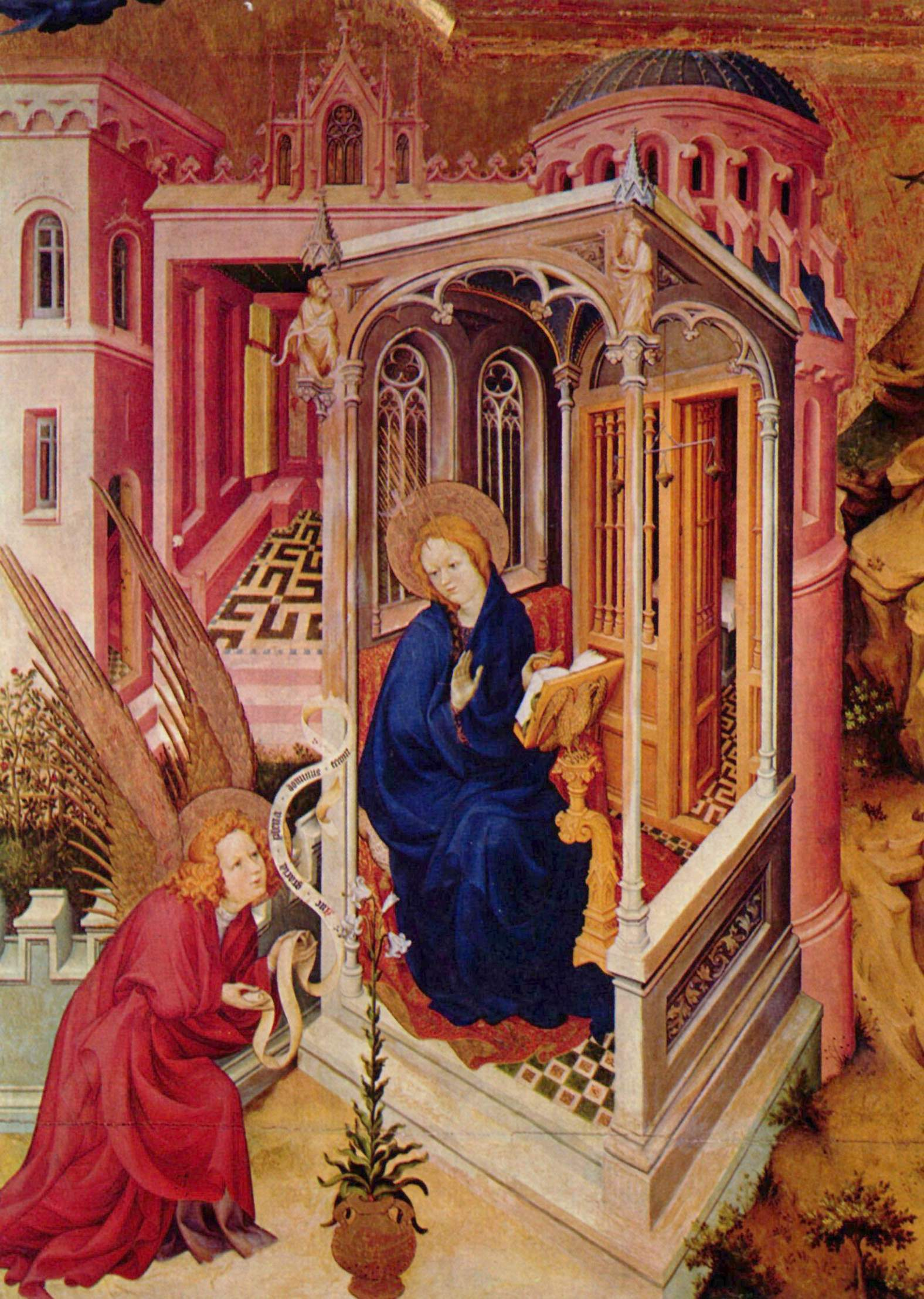 detail